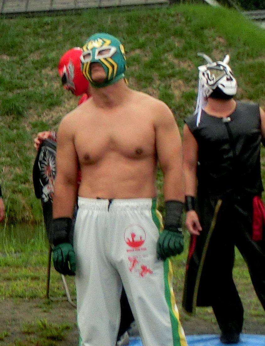 HAMATANI